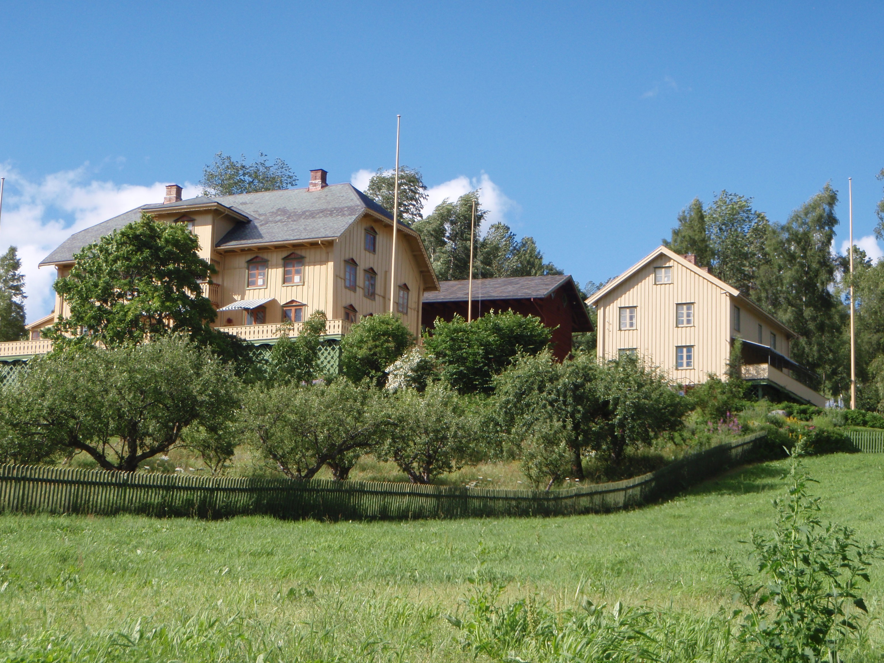 Aulestad var Bjørnstjerne og Karoline Bjørnsons hjem. Det er et av de fredete kunstnerhjemmene i Norge